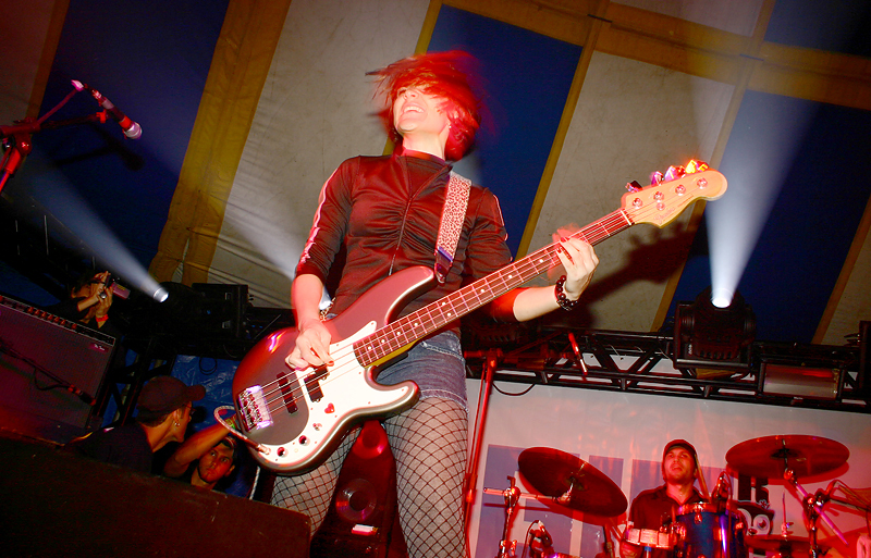 Selma Vieira, então baixista do Autoramas, em concerto em 2007